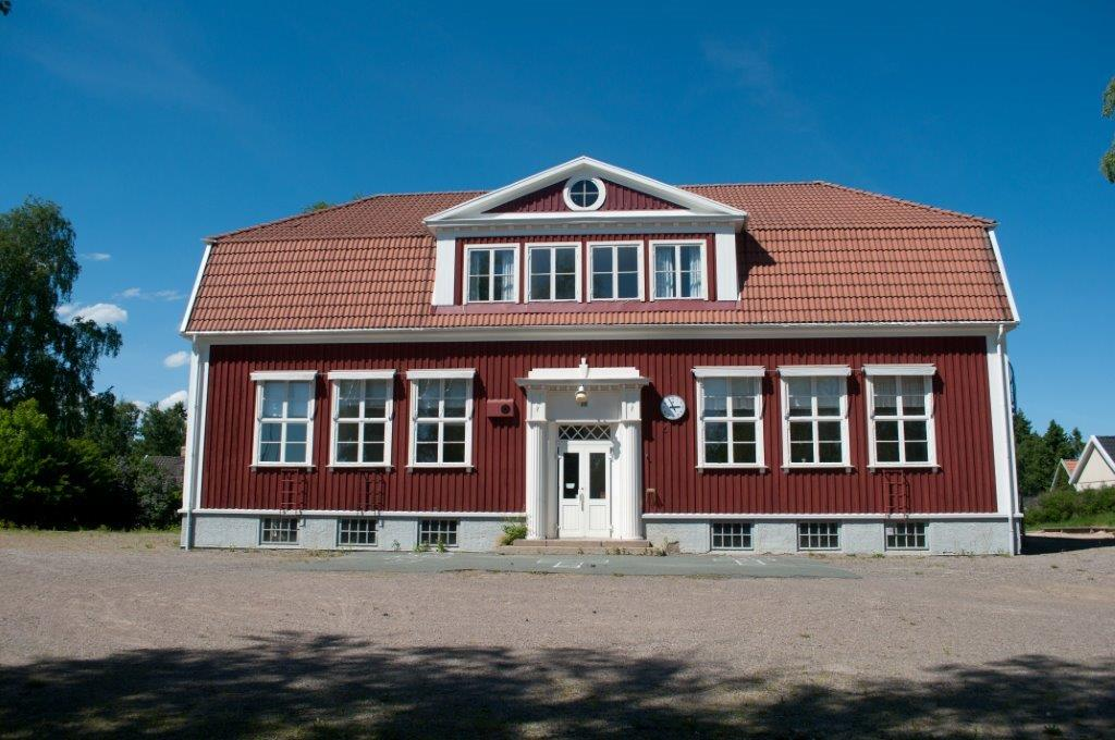 Bilden visar Gröne vägens skola i Habo